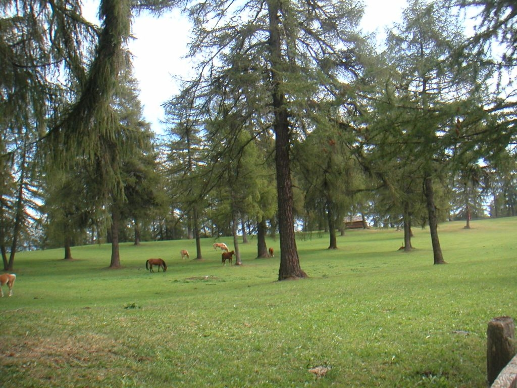 Haflingerpferde auf dem Salten